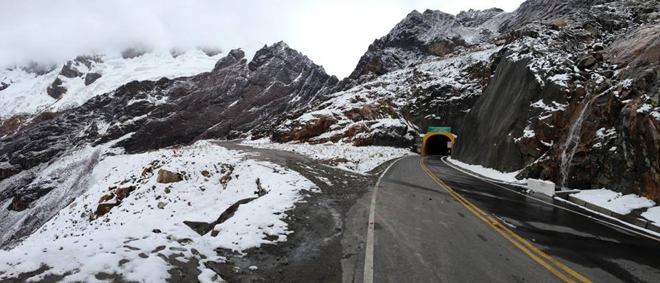 Panorama Tunel Punta Olimpica